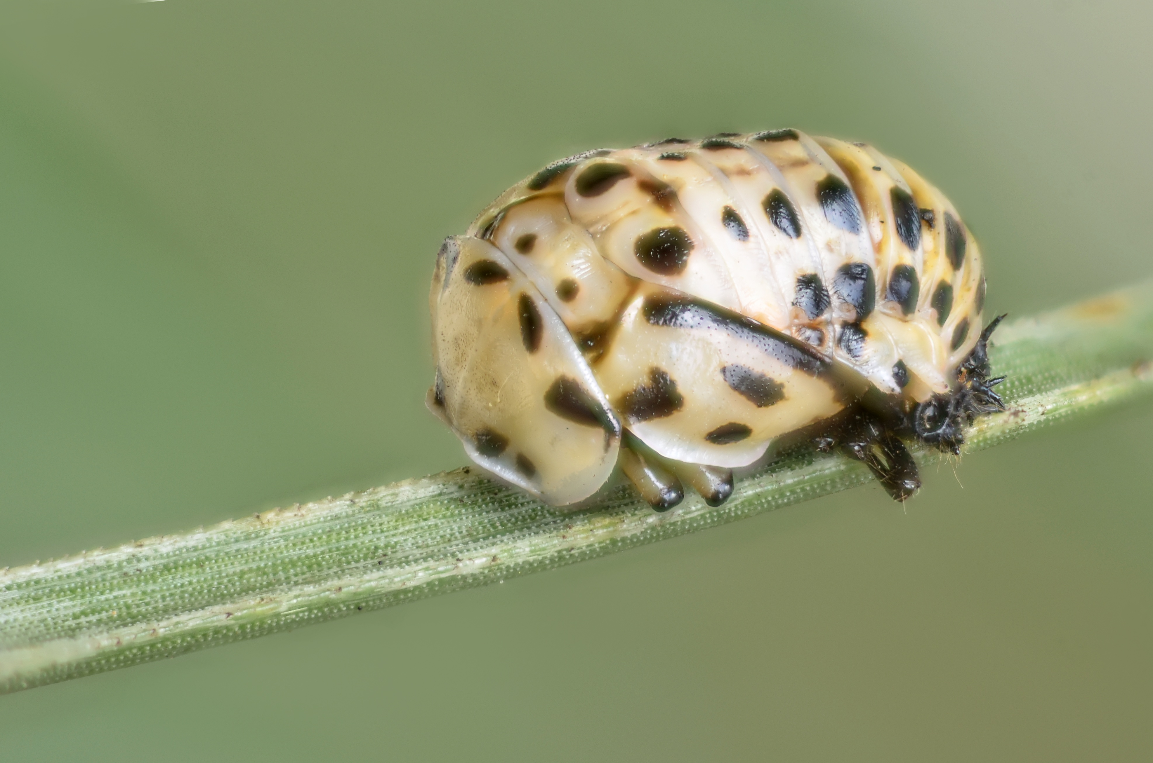 Anatis ocellata pupa